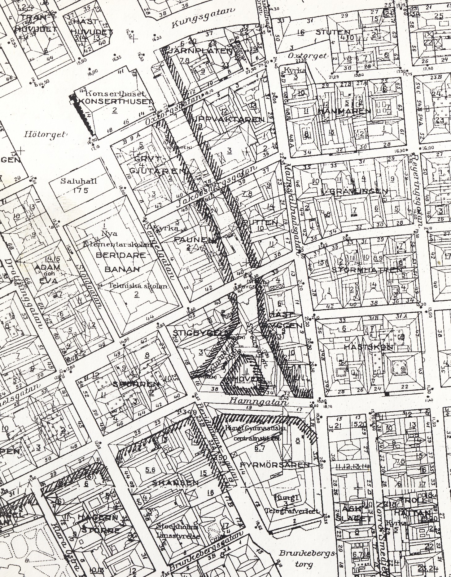 Rekonstruktion av P.O. Hallmans förslag till dragning av Sveavägen i Stockholm 1912, inlagd i en senare karta